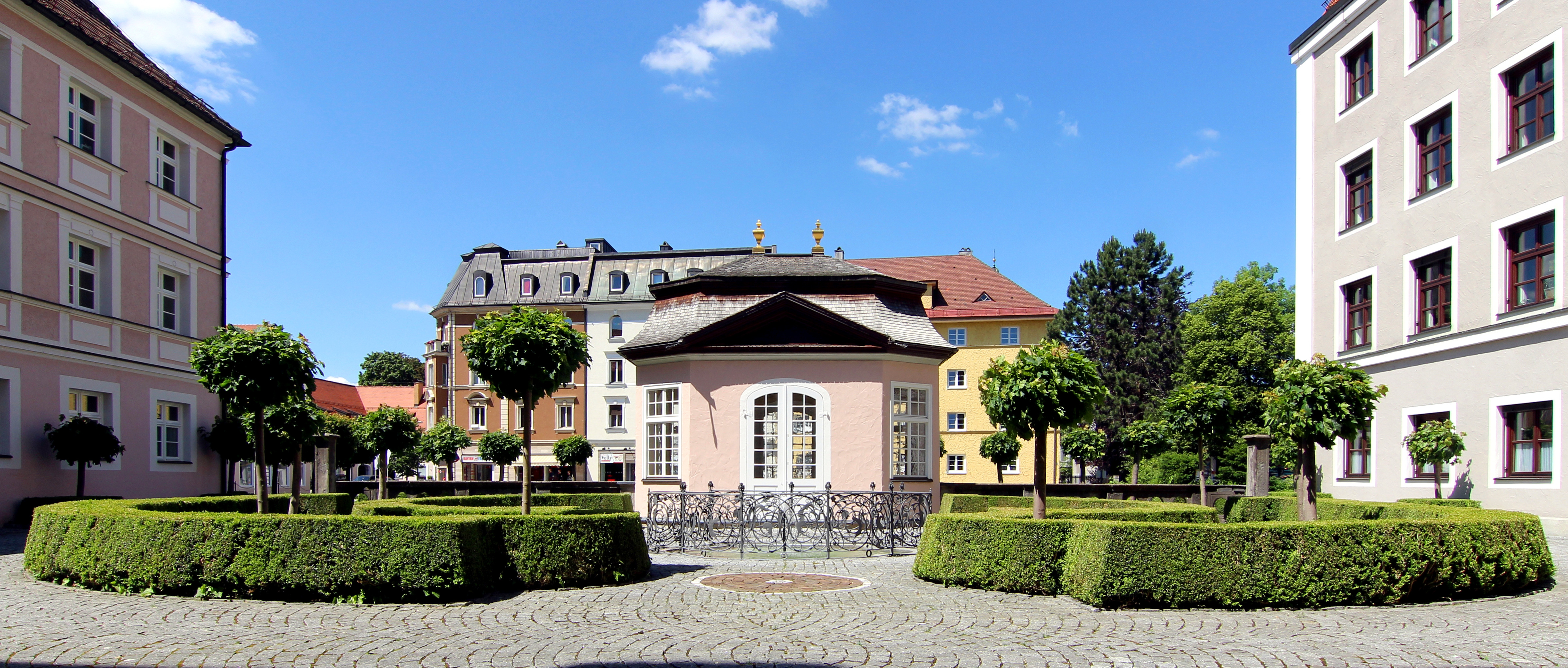 Floratempel, Kempten